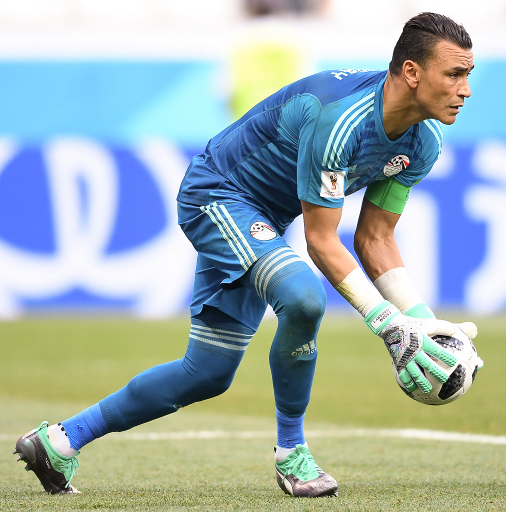 Египет с Салахом проиграл Саудовской Аравии